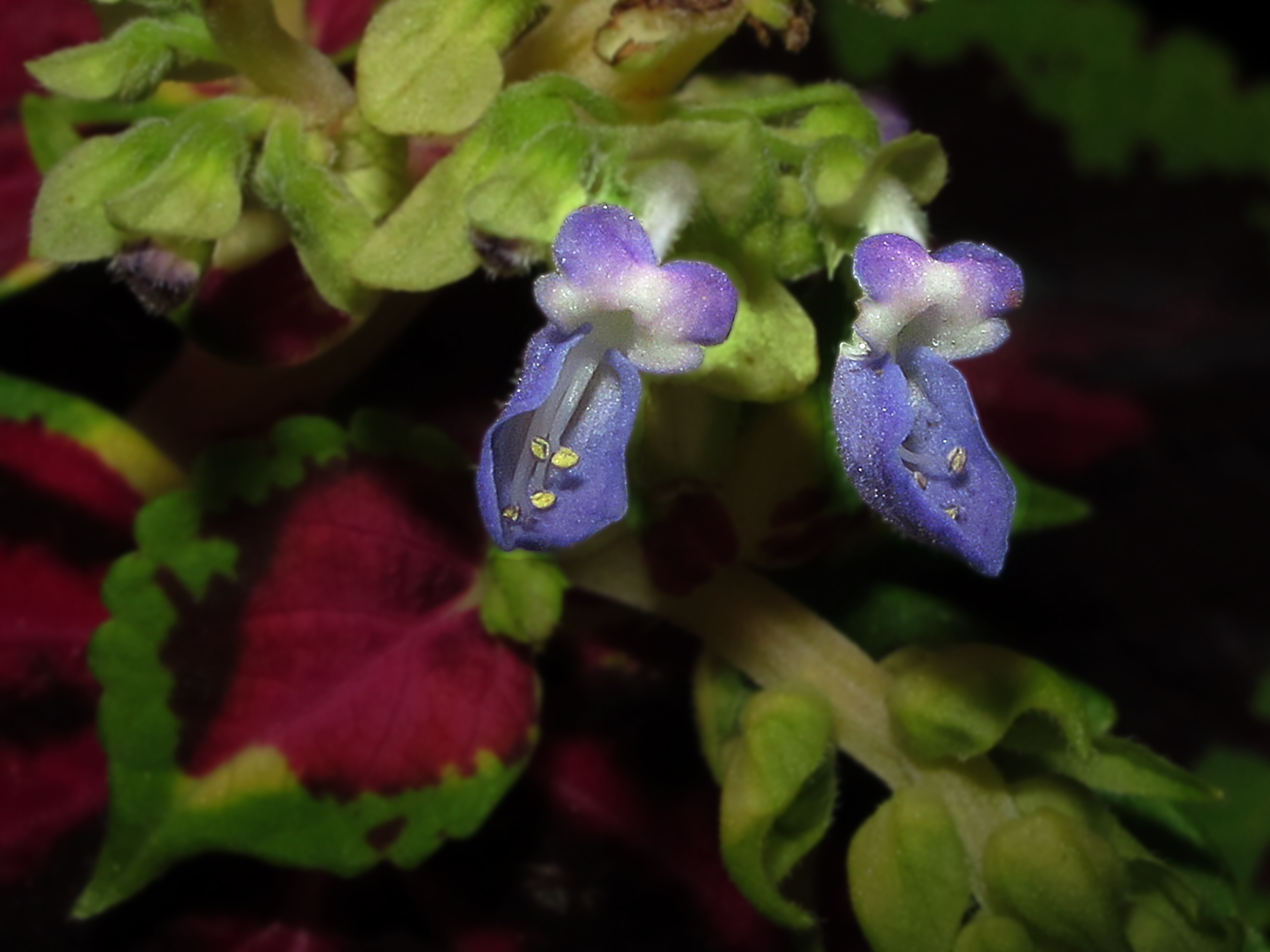 Feliz ..... QUINTA-FLOWER !!! ♫ ✿◠‿◠